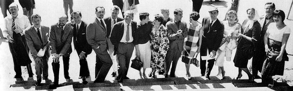 TV-teaterensemblen 1960/61